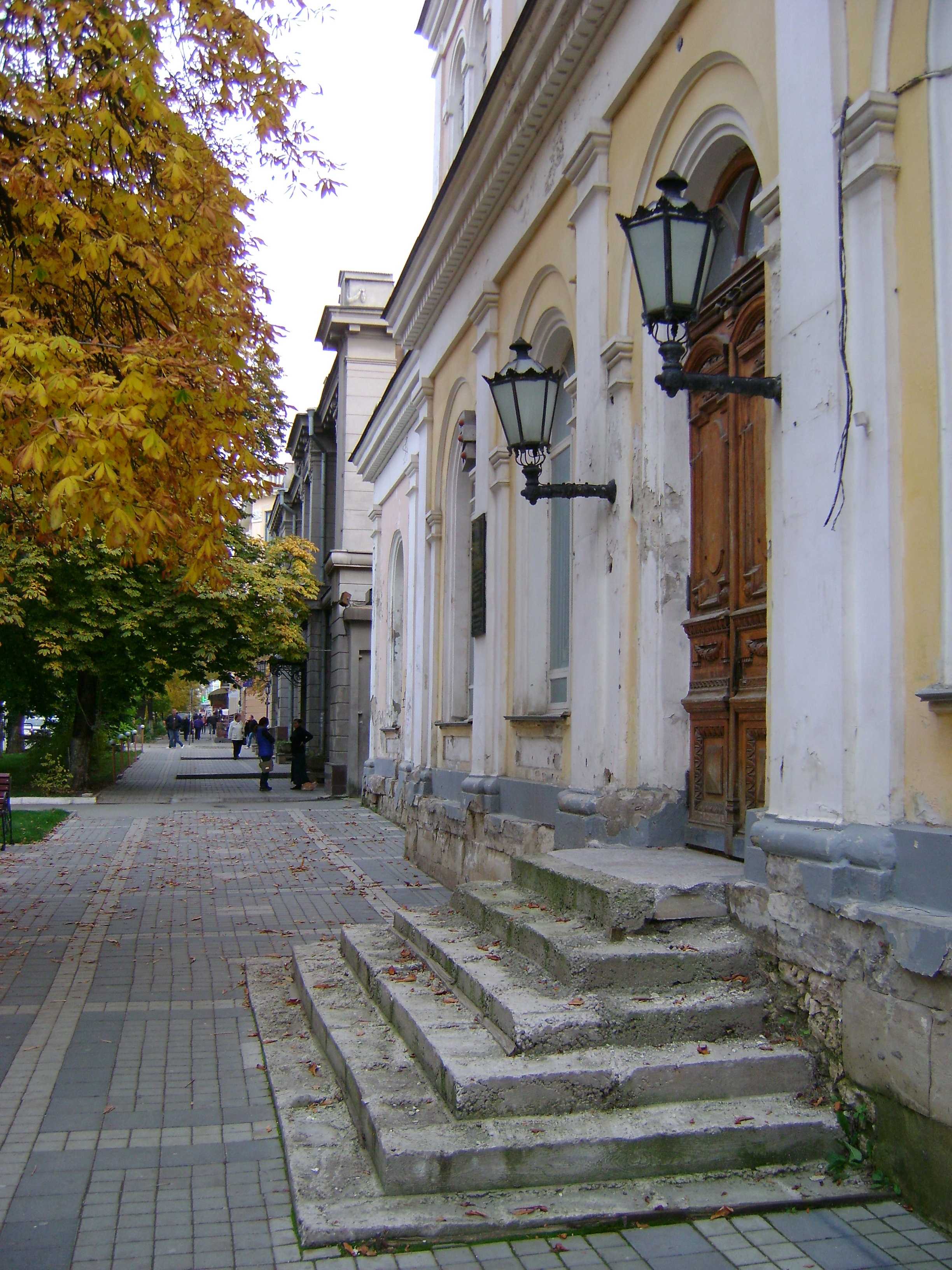 Будинок Дворянського зібрання (будівля, в якій працював М.І. Пирогов), Сімферополь, вул. Горького, 10,літер В